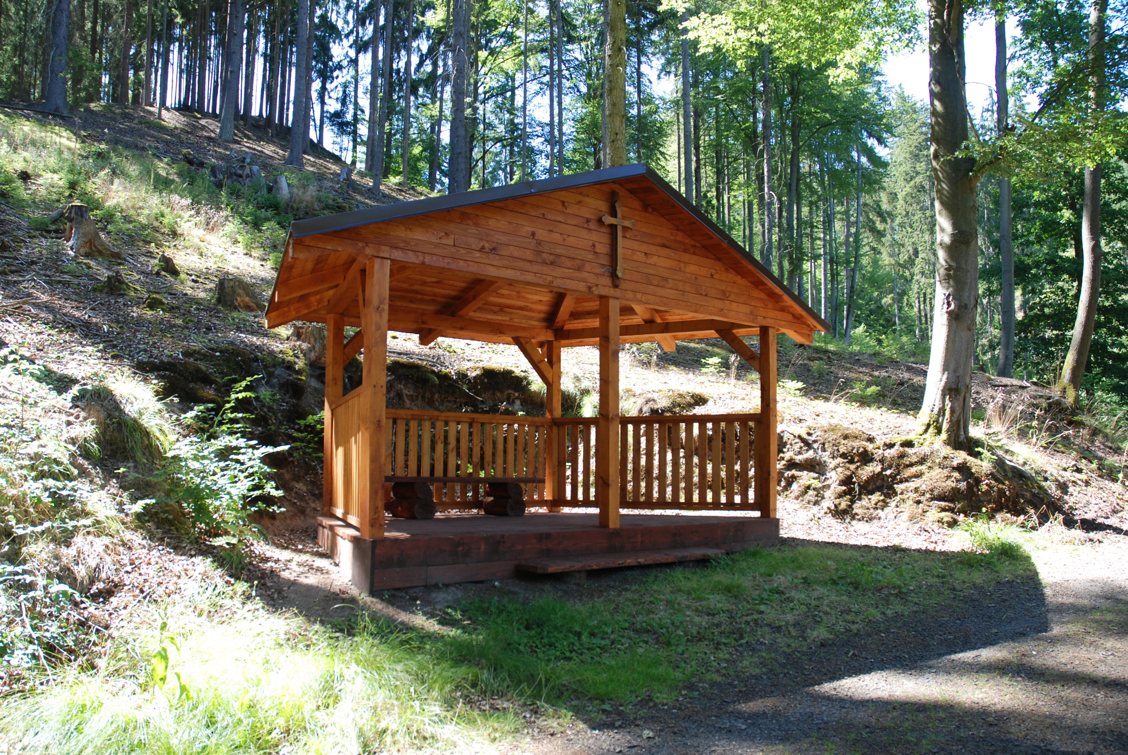 Chata U Ave Maria v karlovarských lázeňských lesích